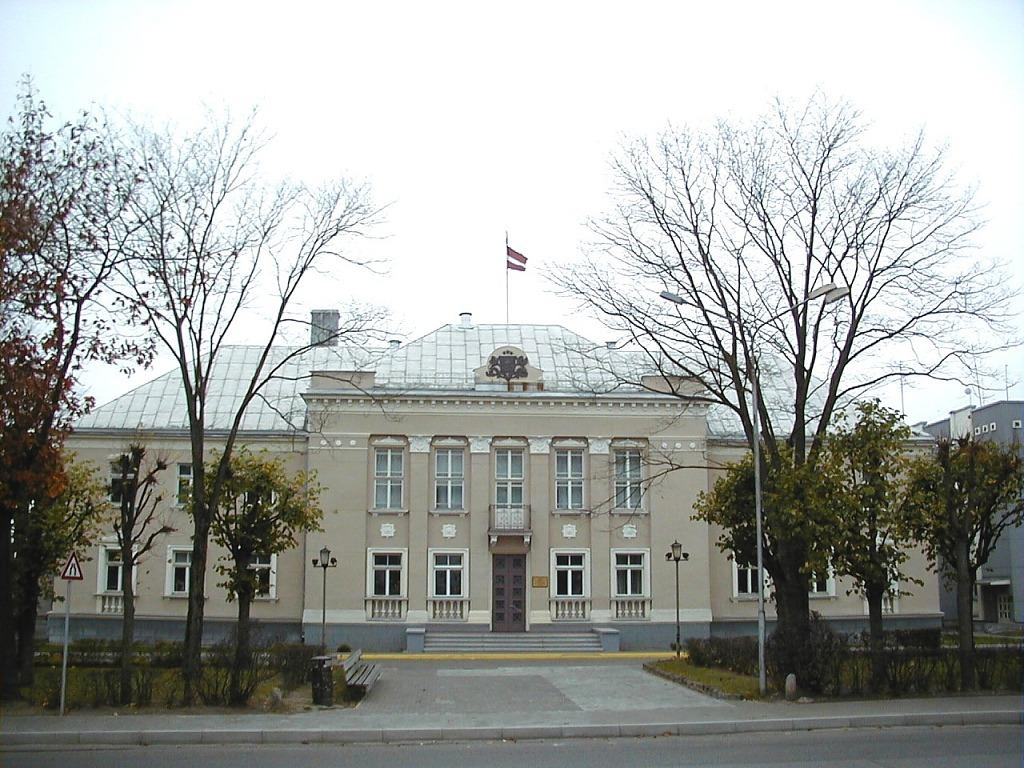 Rēzeknes pilsētas dome. 2000-10-14